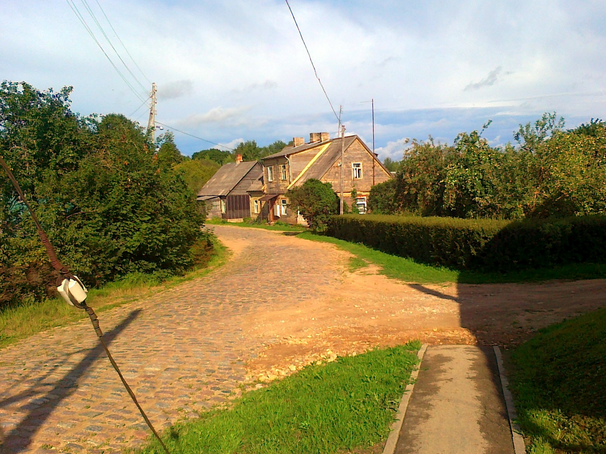 Viesīte. Biržu ielas bruģis. Biržu street. July, 2013